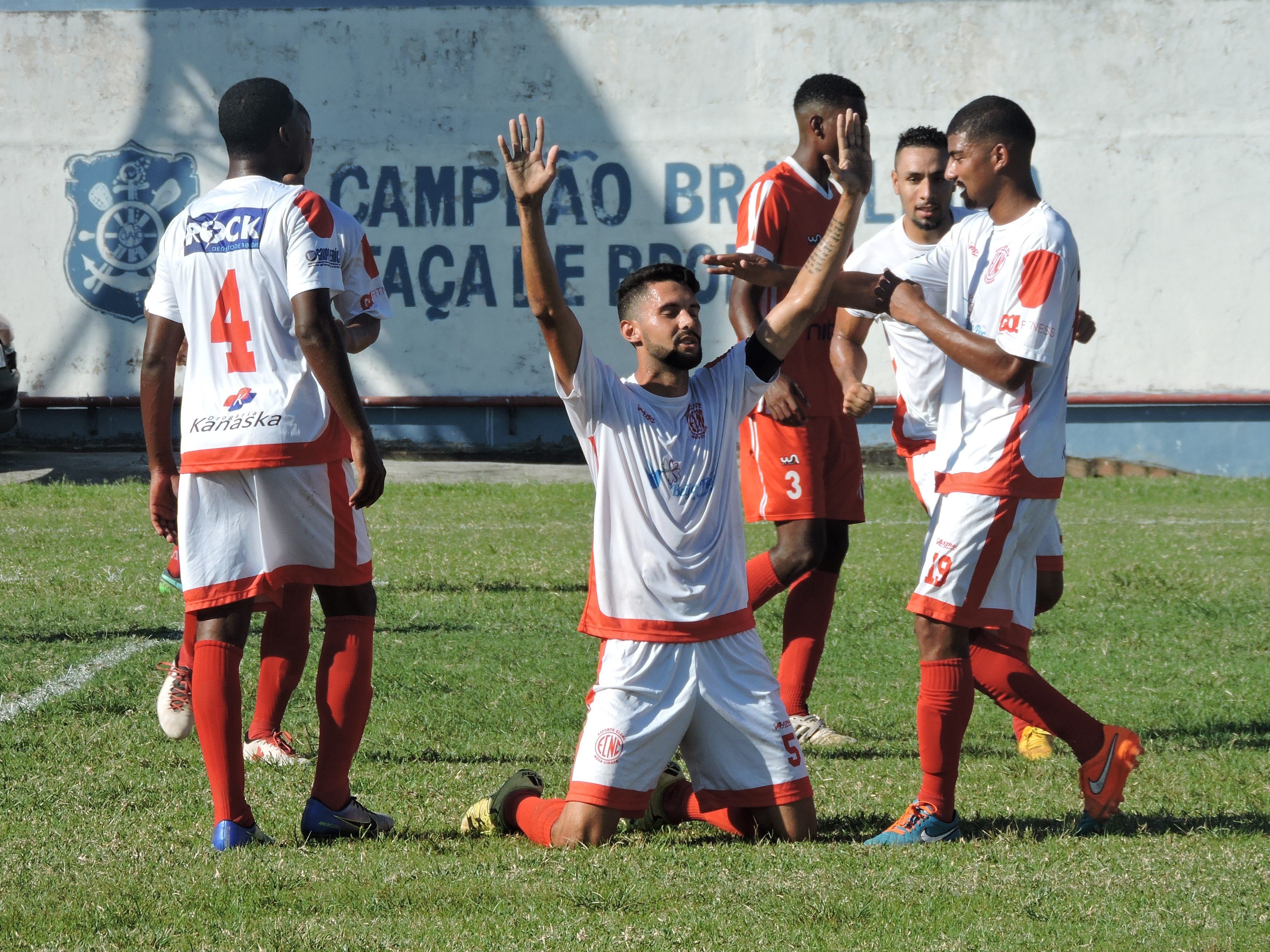 Napu fez dois dos cincos gols marcados no jogo. Partida da confirmação do primeiro lugar na classificação geral da Série B2. (Bela Vista 0 x 5 Nova Cidade - Rua Bariri)